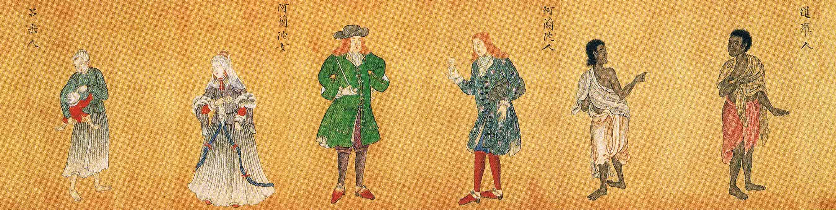 小原慶山画-文山賛-西洋東洋人物図巻